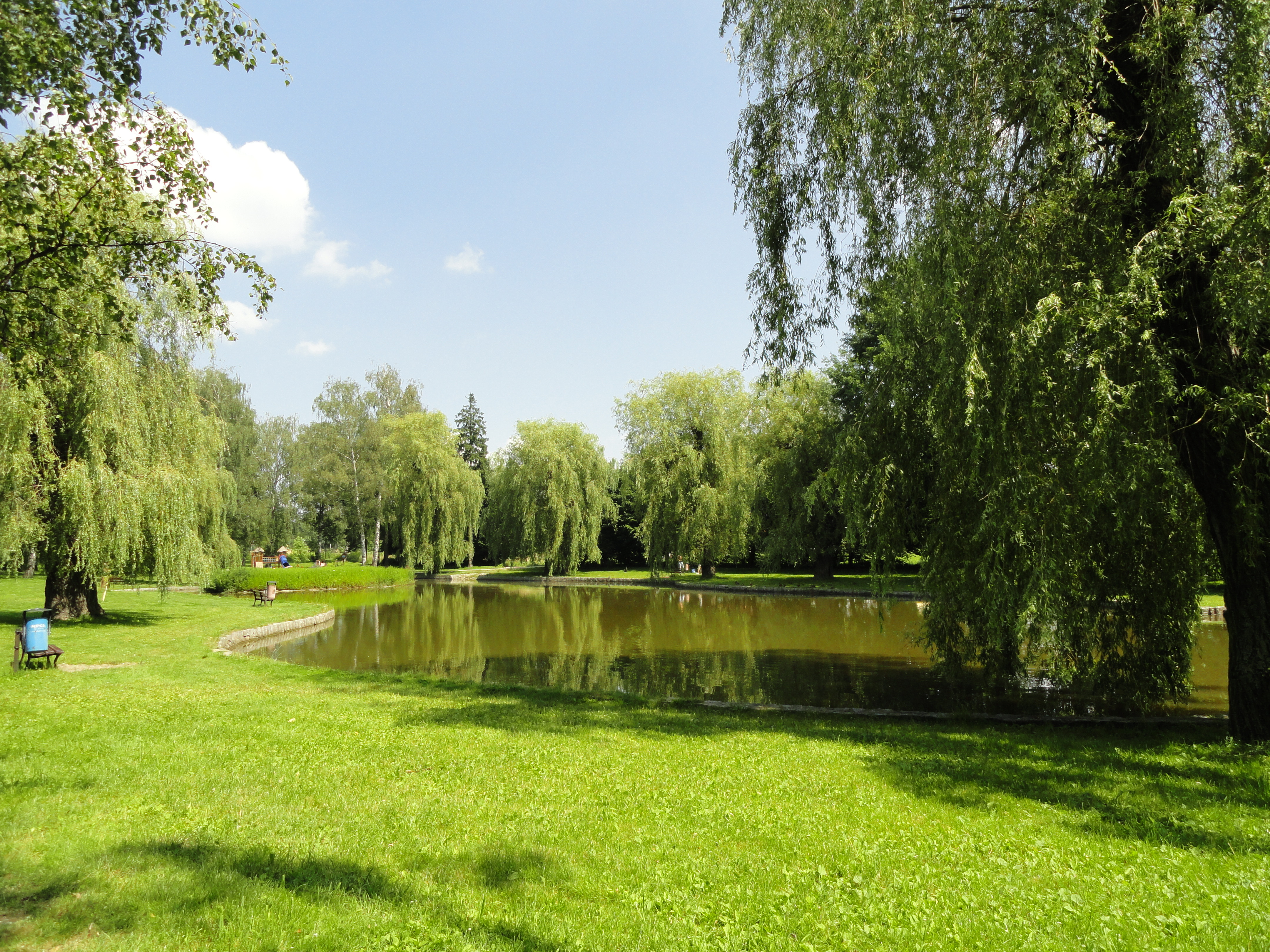 Großer Teich des ehemaligen Henneberggartens in Zgorzelec